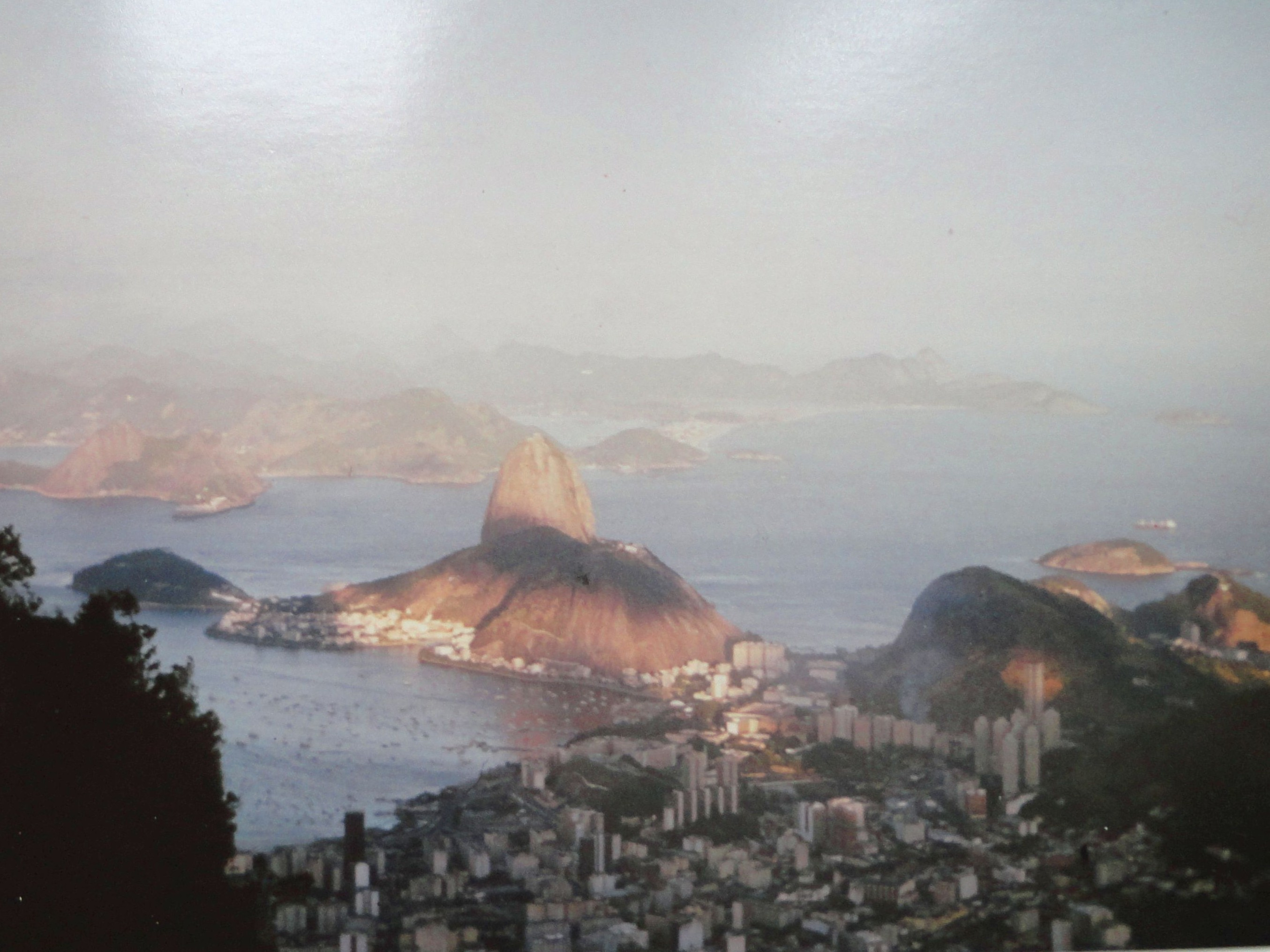 Der Zuckerhut vor Rio de Janeiro von der Christusstatue auf dem Corcovado aus gesehen, Interzonenturniere 1979 In Rio.